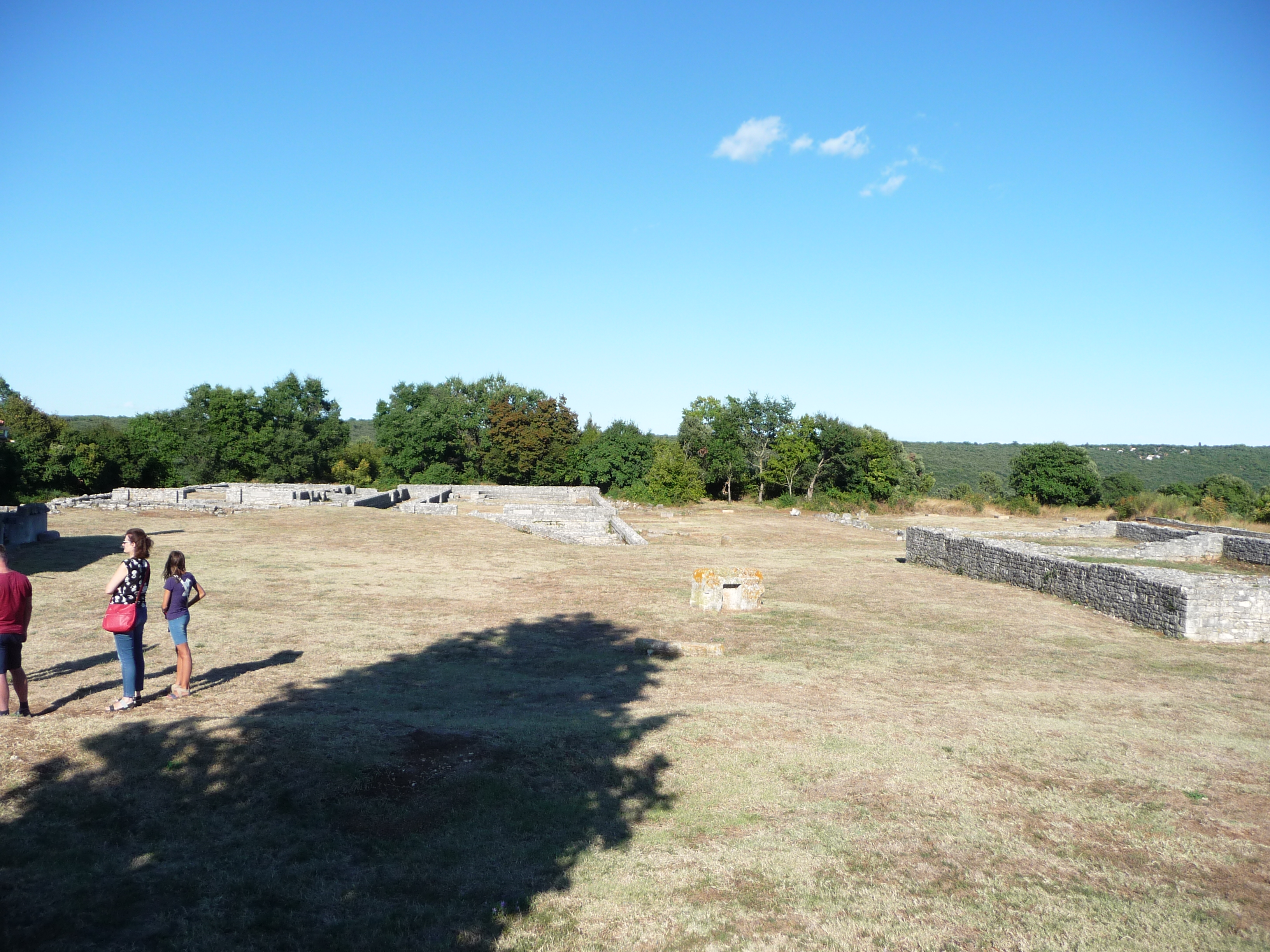 Nesactium, Istria.